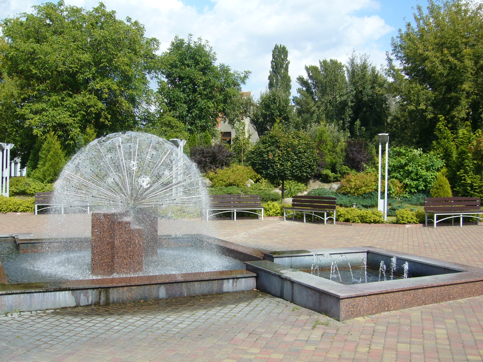 Fontanna na dziedzińcu przy Bibliotece Uniwersytetu Łódzkiego.